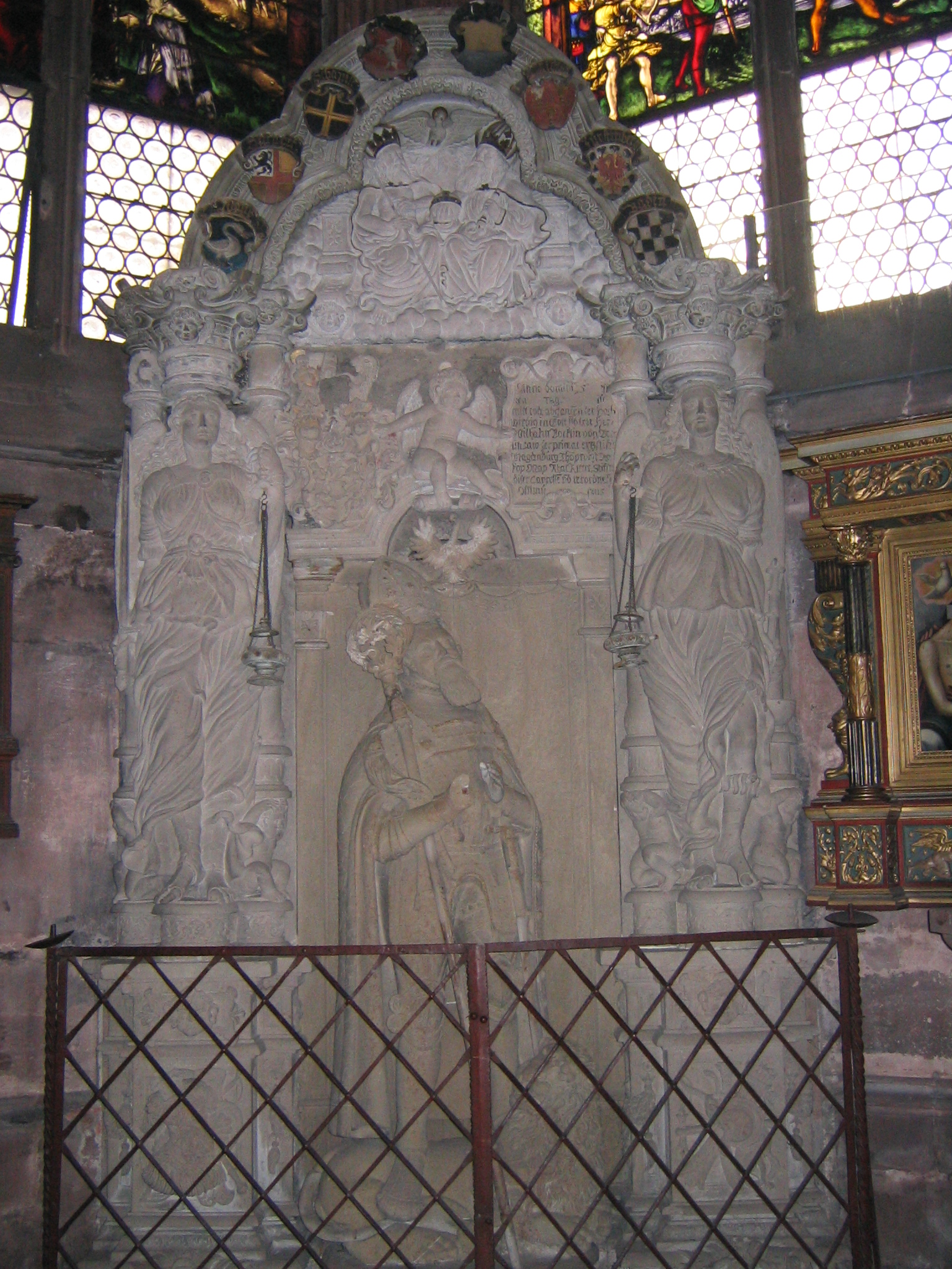 Grabmal des Domprobstes Wilhelm Böcklin von Böcklinsau (gest. 1585) im Freiburger Münster - Man beachte die Kleidung des Domprobstes